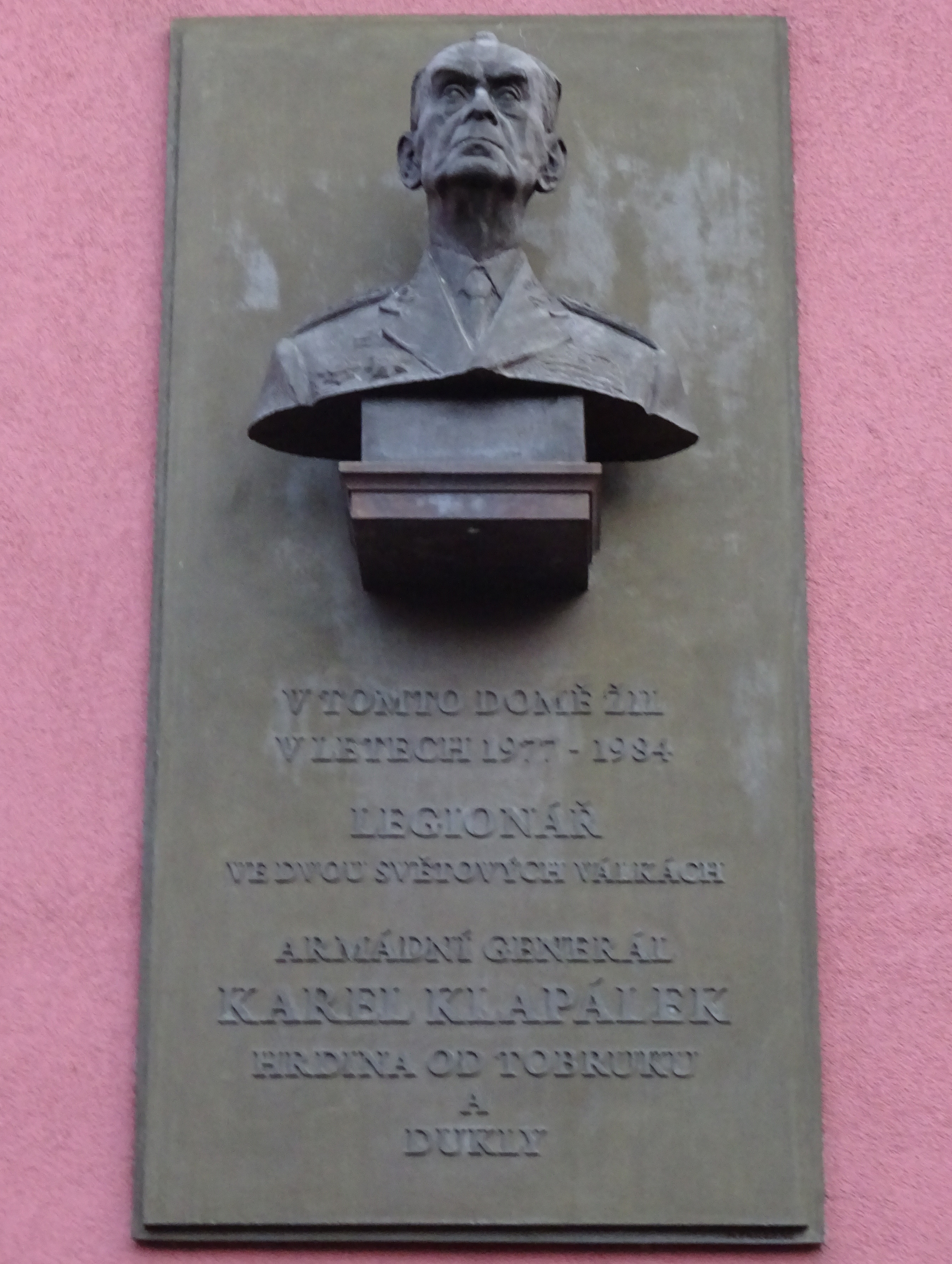 V tomto domě žil v letech 1977-1984 legionář ve dvou světových válkách; armádní generál Karel Klapálek; hrdina od Tobruku a Dukly.